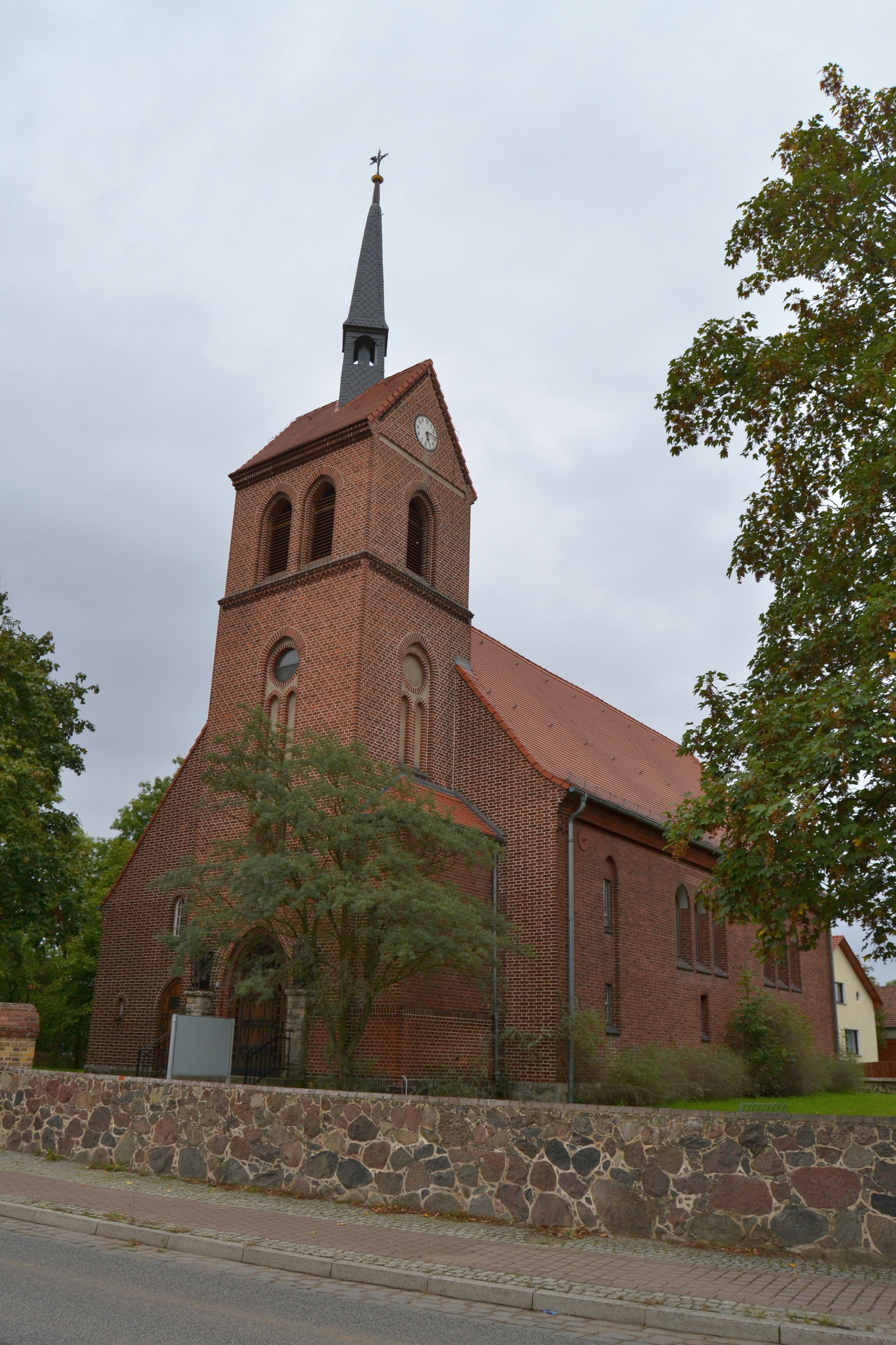 Die Petruskirche in Petershagen bei Berlin